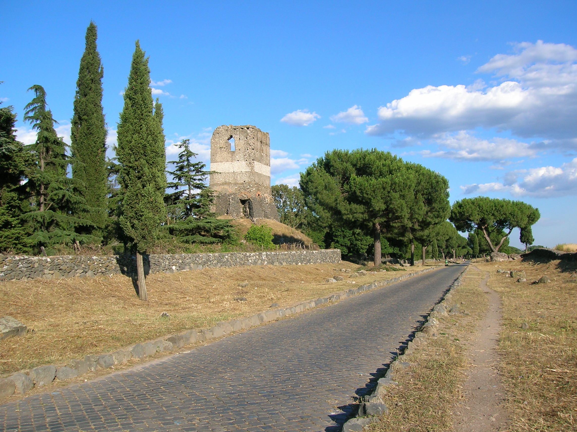 Appia antica, Torre Selci